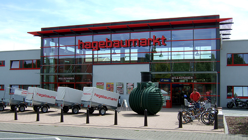 Hagebau Baumarkt